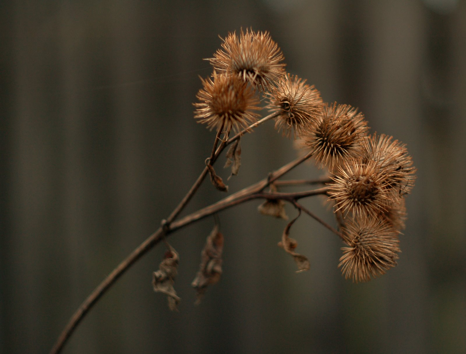 Arctium lappa łopian - rzep